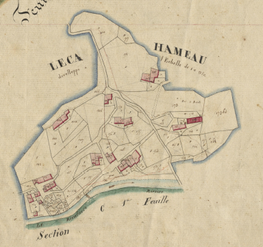 Leca (Cortsaví) en el Cadastre napoleònic del 1812 (Arxius Departamentals dels Pirineus Orientals)